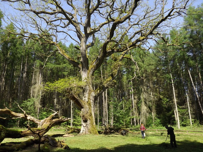 Naturdenkmal Schirmeiche Goor im Naturschutzgebiet Goor-Muglitz auf Rügen